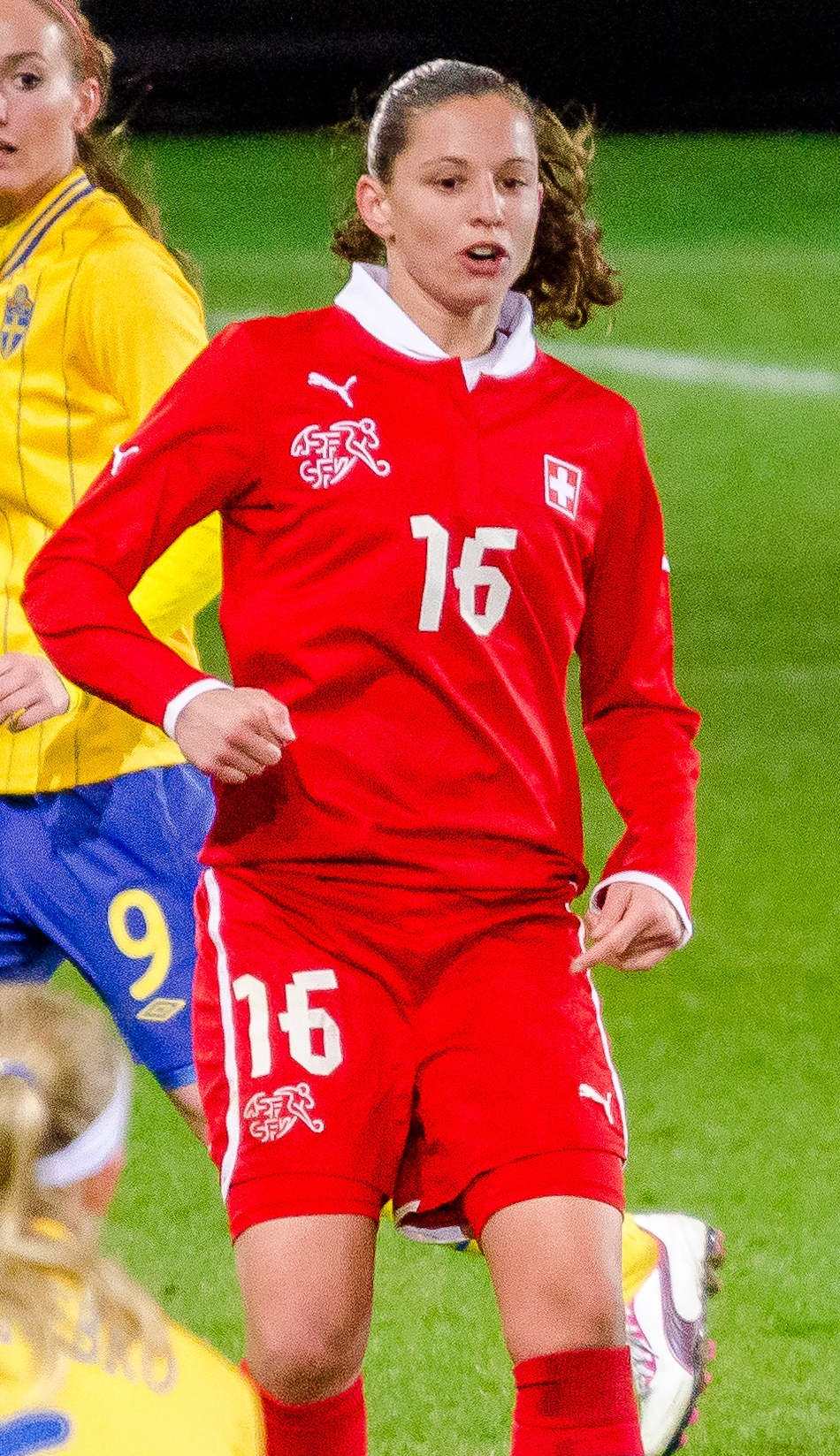 Schweiziskan Fabienne Humm i den första landskampen på Myresjöhus Arena (tillika Pia Sundhages debut som svensk förbundskapten) 23 oktober 2012, där Sverige slog Schweiz med 3-0 inför 4905 åskådare.